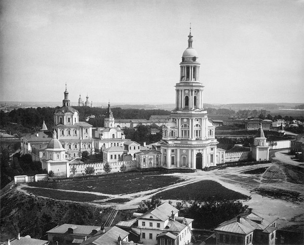 Спасо-Андроников мужской монастырь. Общий вид с колокольни церкви Сергия Радонежского в Рогожской слободе. Слева Михаило-Архангельская церковь, правее - Спасский собор. В колокольне помещалась церковь Симеона, сродника Господня. Вдалеке виден единоверческий Троицкий храм, что у Салтыкова моста. 1882 год.